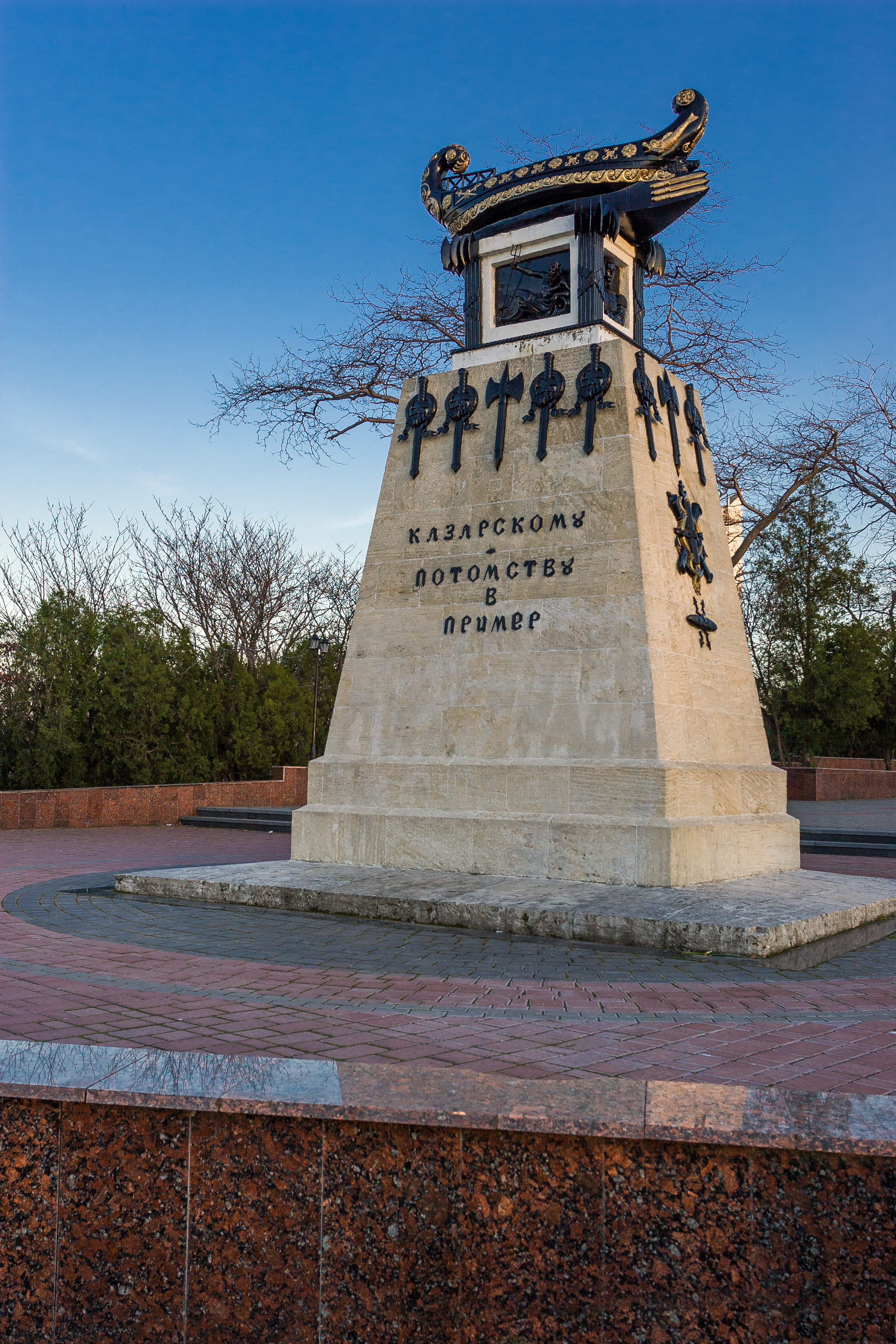 Памятник Казарскому: бульвар Матросский, Ленинский район, Севастополь The legal status of the Crimean region is currently disputed. This template makes no claims in this respect.